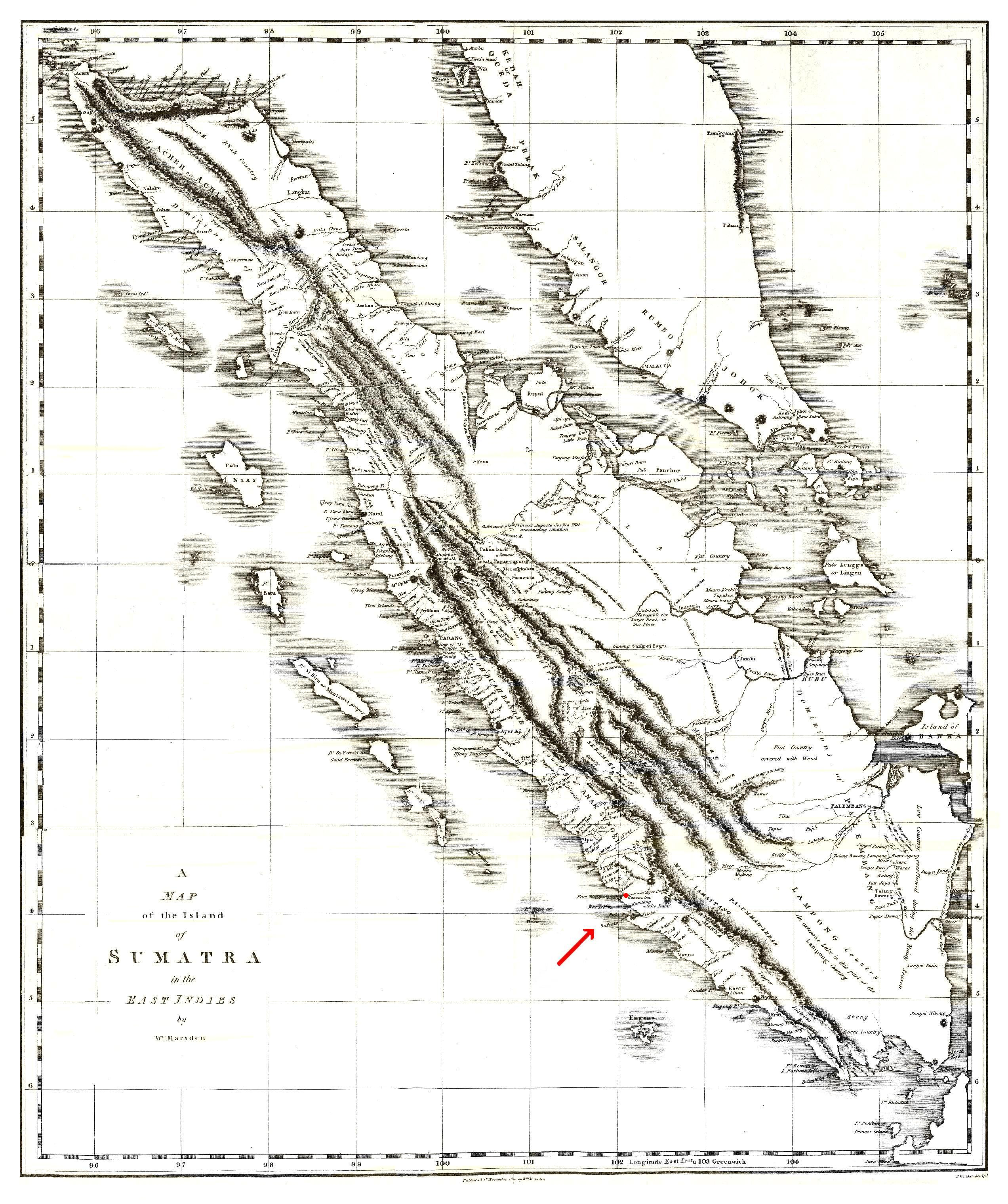 Map of Sumatra